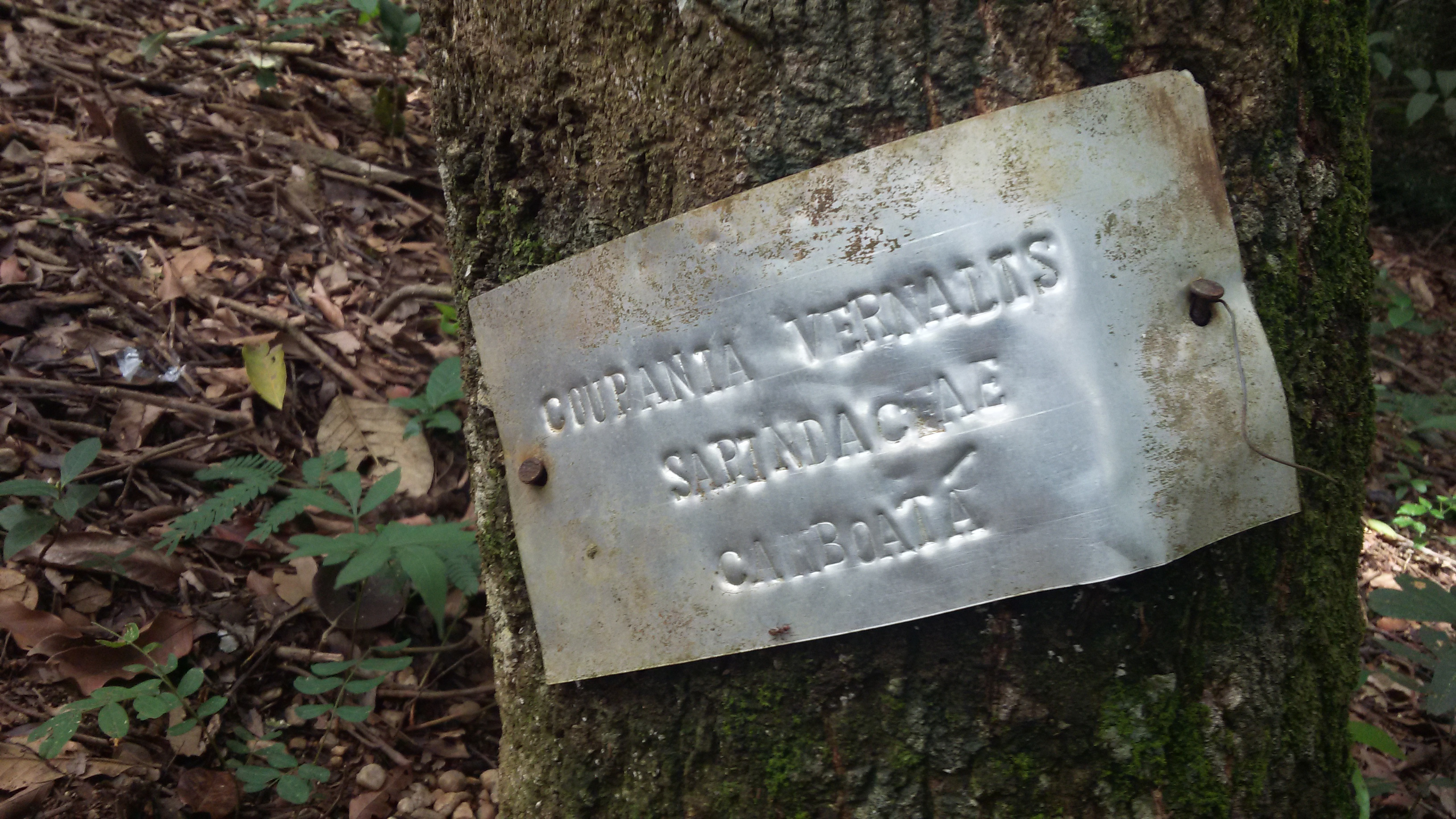 los nombres de los árboles sin bastantes curiosos.